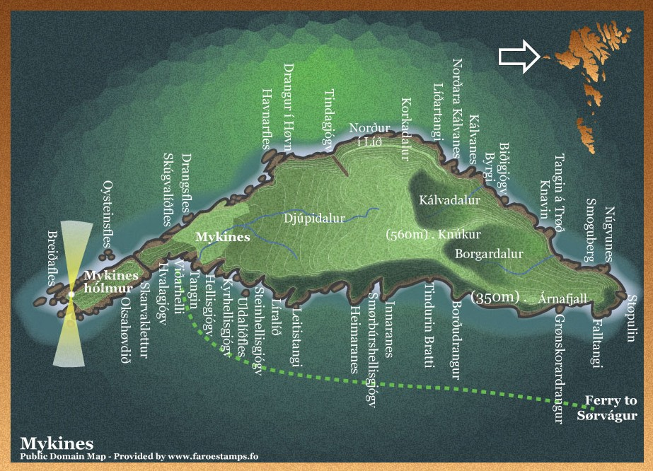 Mykines, Faroe Islands